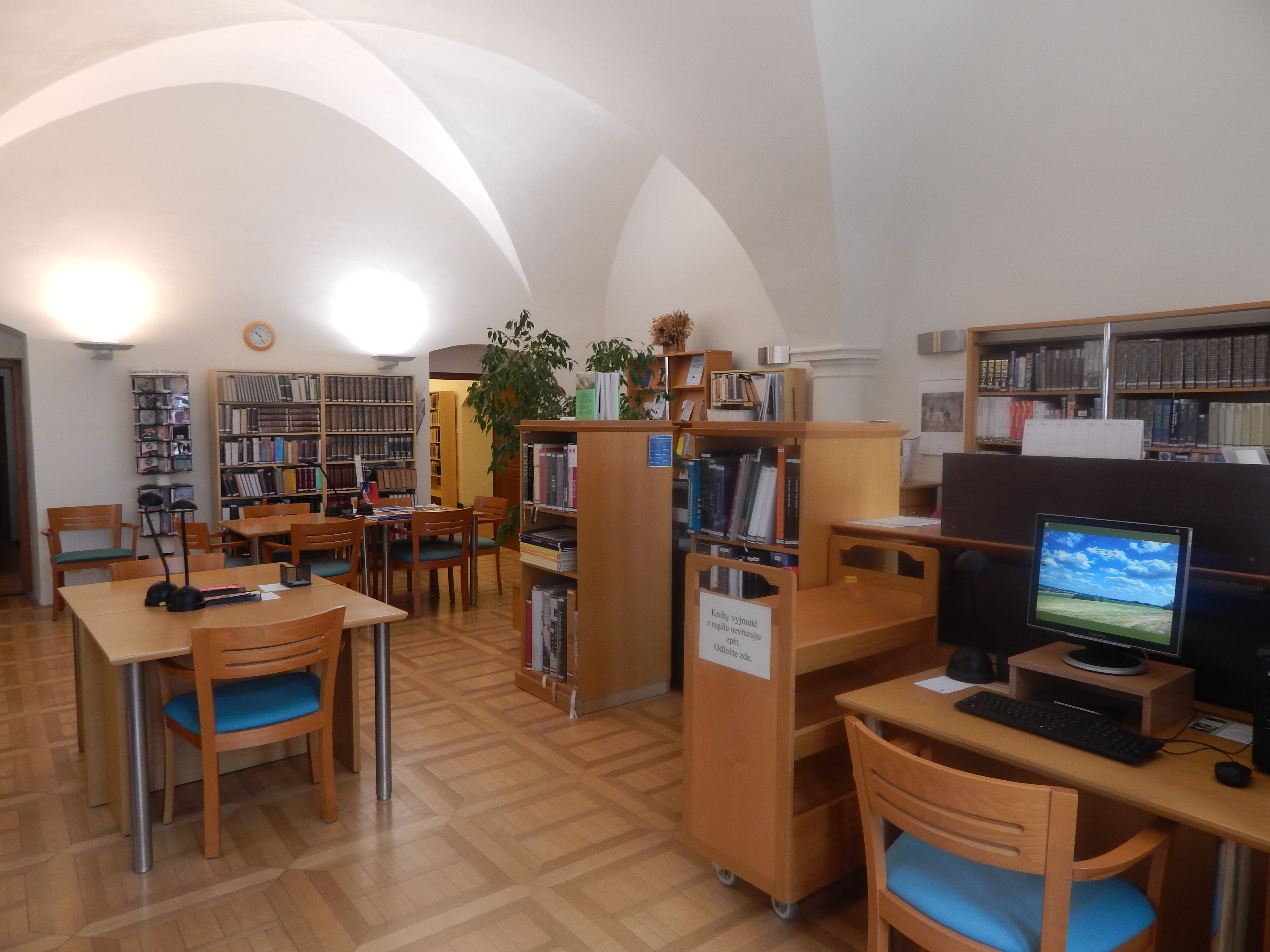 Všeobecná studovna, Krajská knihovna v Pardubicích, 2019